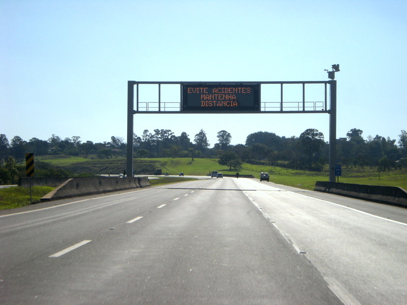 Painél Rodoviário instalado na Rodovia dos Bandeirantes, sentido Capital-Interior, na altura do trecho de Jundiaí.